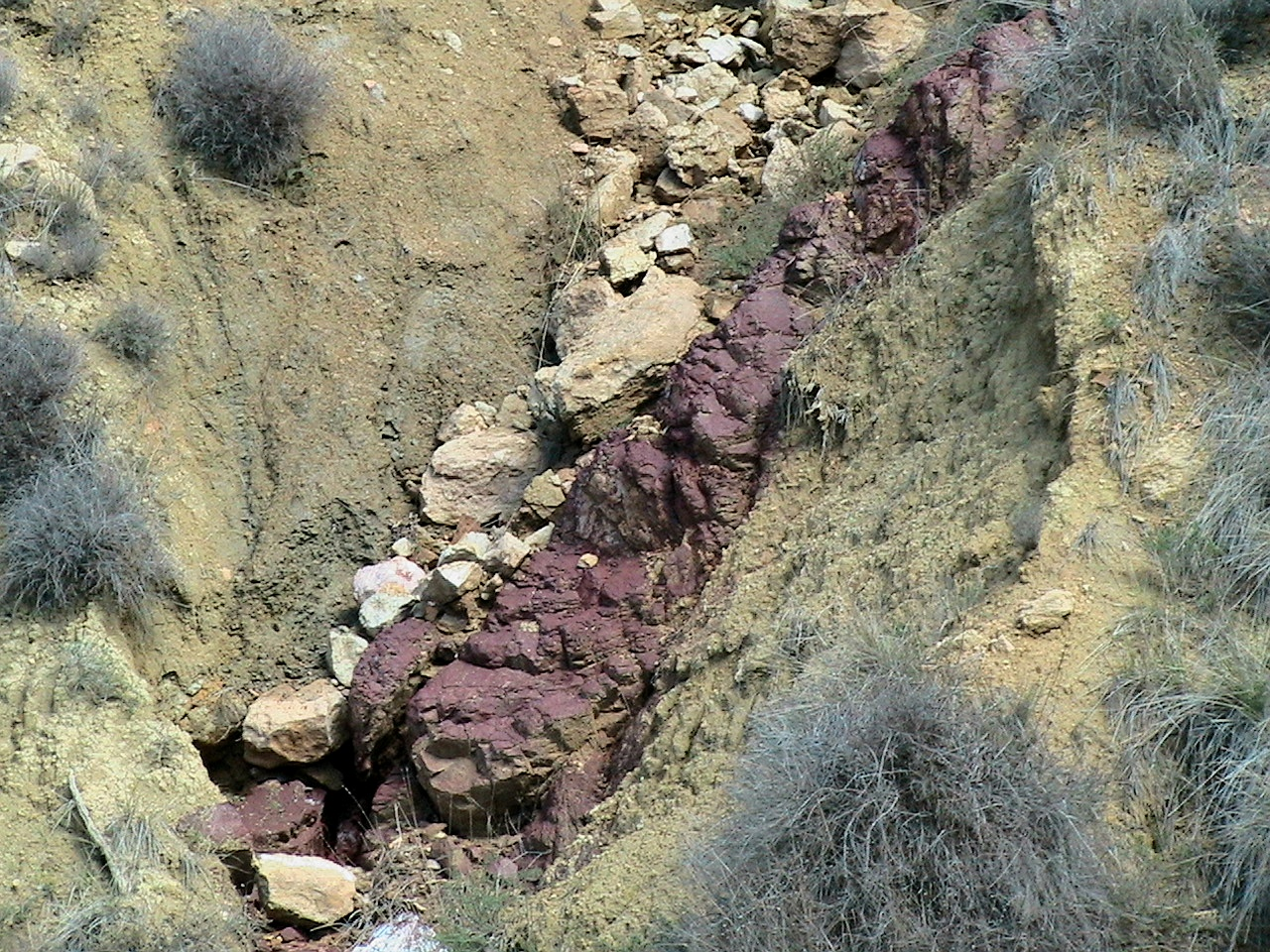 Aflorament de bauxita a la muntanya de Sant Mamet